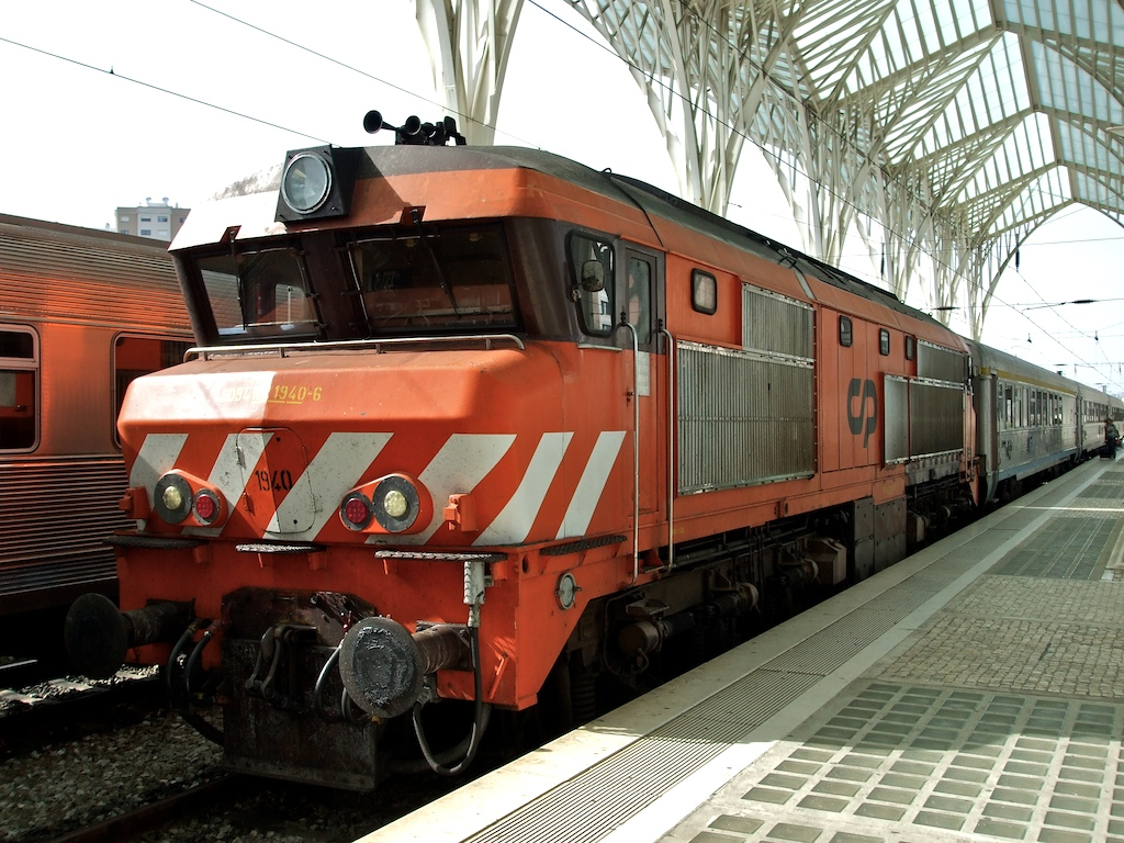 Tipo: Comboio Intercidades 696 [Lisboa • Oriente - Évora] Local: Gare do Oriente [Linha do Norte, PK 6] Data e hora: 3 de Maio de 2008 [17h11] Material: Locomotiva 1940 + 3 carruagens Sorefame Renovadas